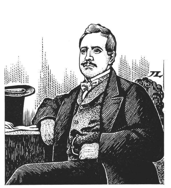 Portrait de John BRANDER, 1814-1877, gravure de J. Lebedeff tiré de Tahitiens. Nous avons ici l’auteur de la correspondance familiale et commerciale citée au chapitre xxiii, et une vue de la rade de Papeete à l’époque de cette correspondance.